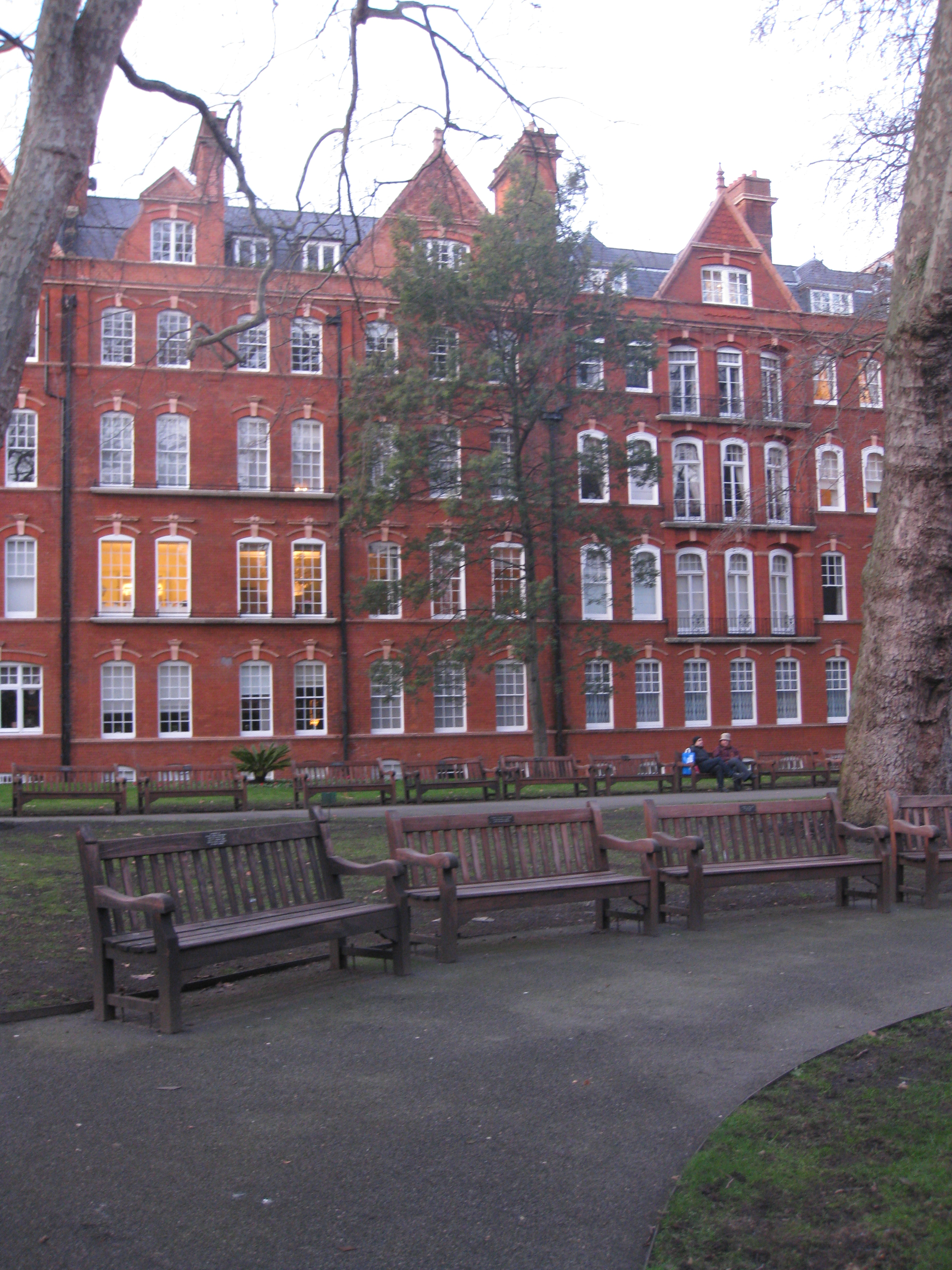 Mount Street Gardens גני רחוב מאונט בלונדון